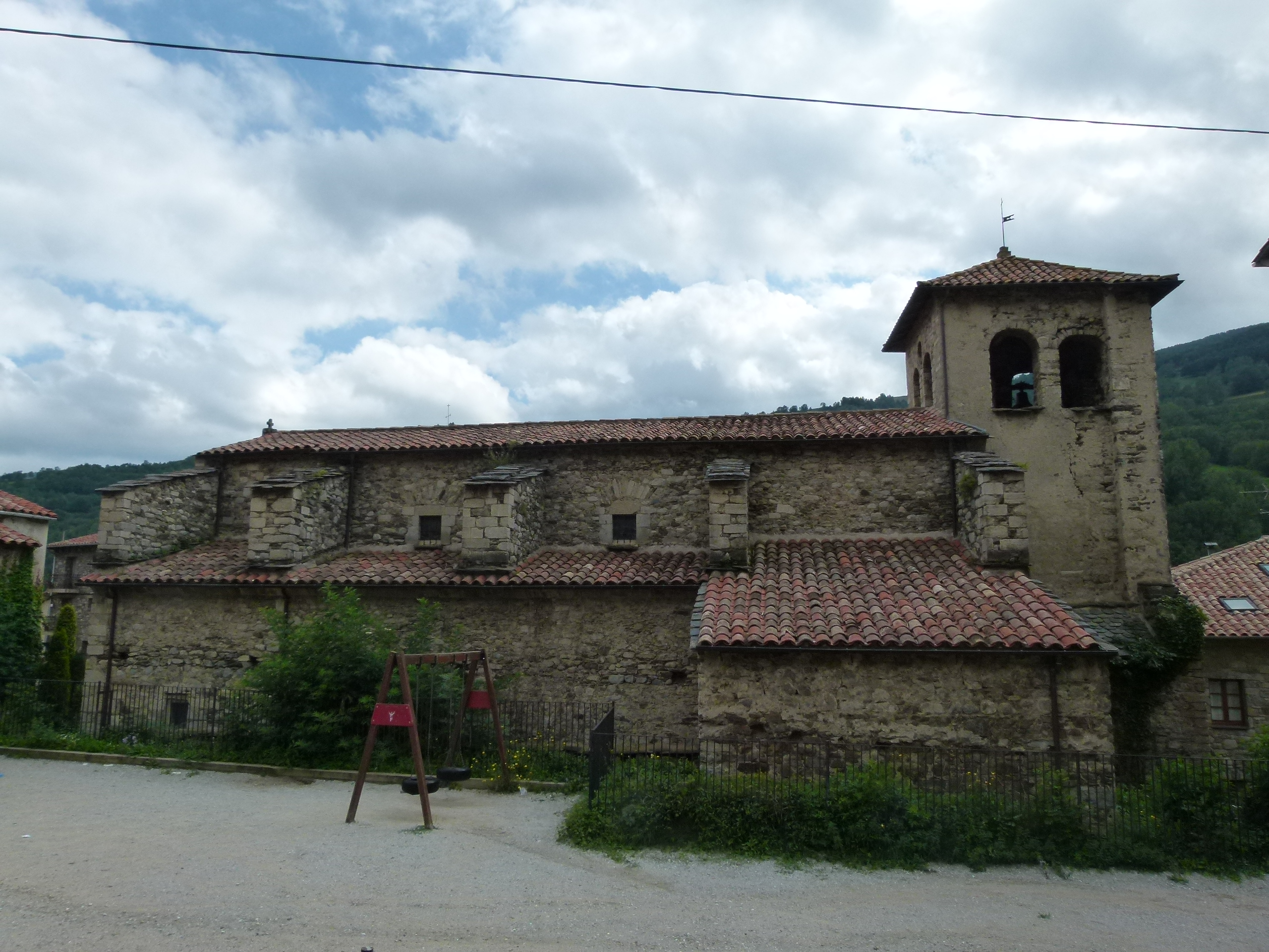 Església parroquial de Sant Martí (Vilallonga de Ter)